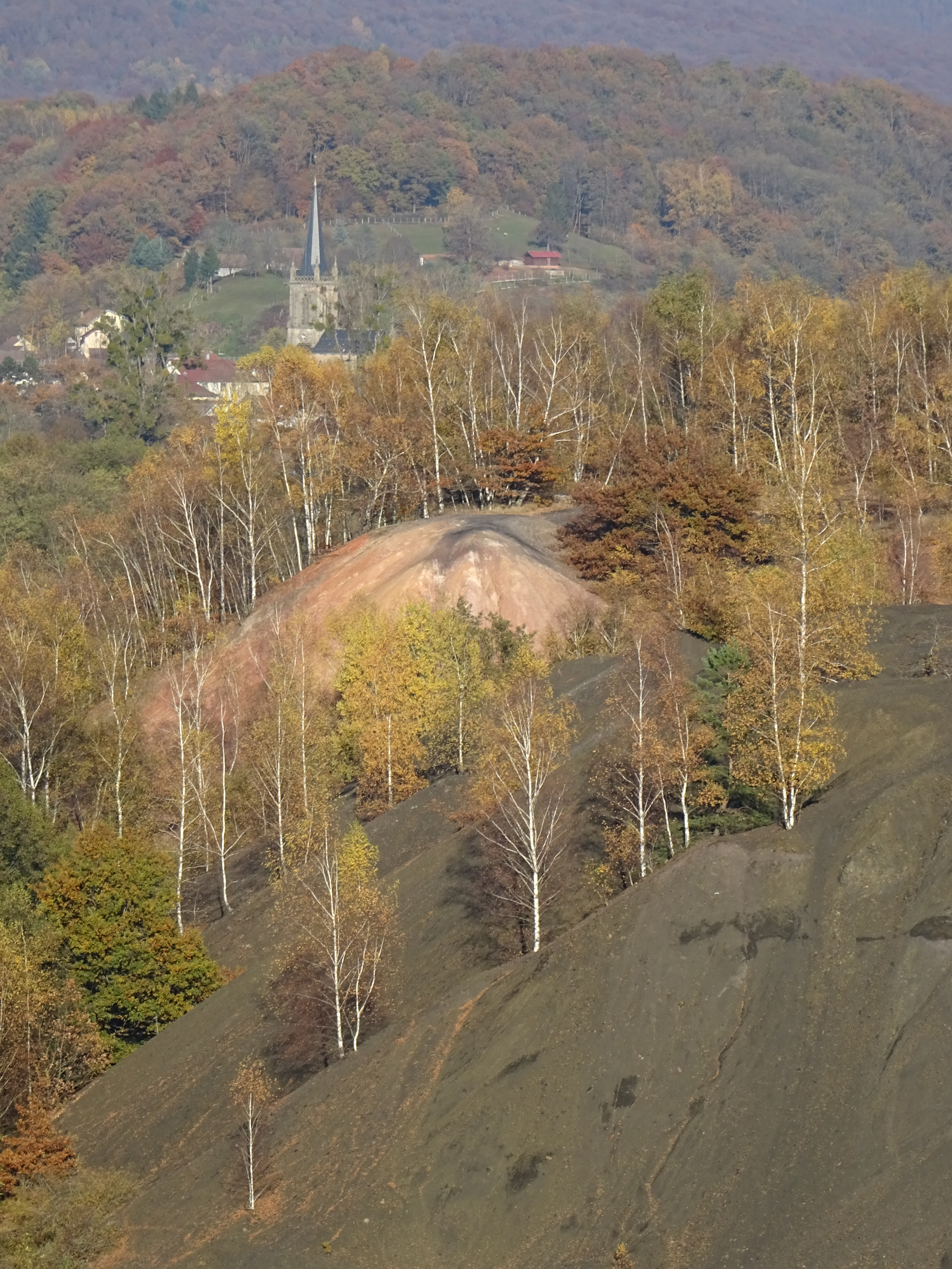 Le terril noir de Magny-Danigon et le terril rouge de Ronchamp vus depuis une colline du Chérimont.